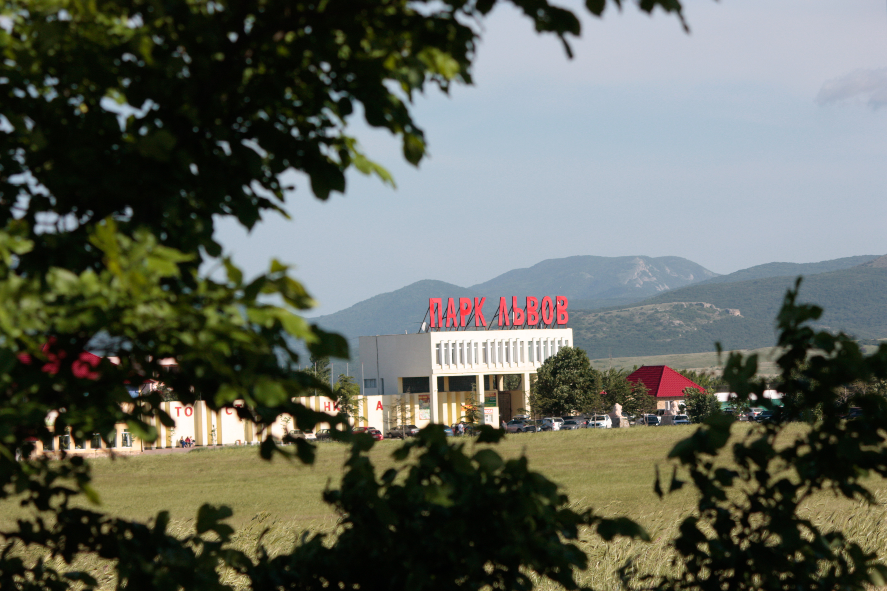 Сафари-парк «Тайган»: ул. Лавандова, 1, г. Белогорск, Белогорский район, Крым This object is located on the Crimean Peninsula and recognized as a protected area by both Russia and Ukraine under the ID: 8210074 / 01-207-5012, respectively. The legal status of the Crimean region is currently disputed.